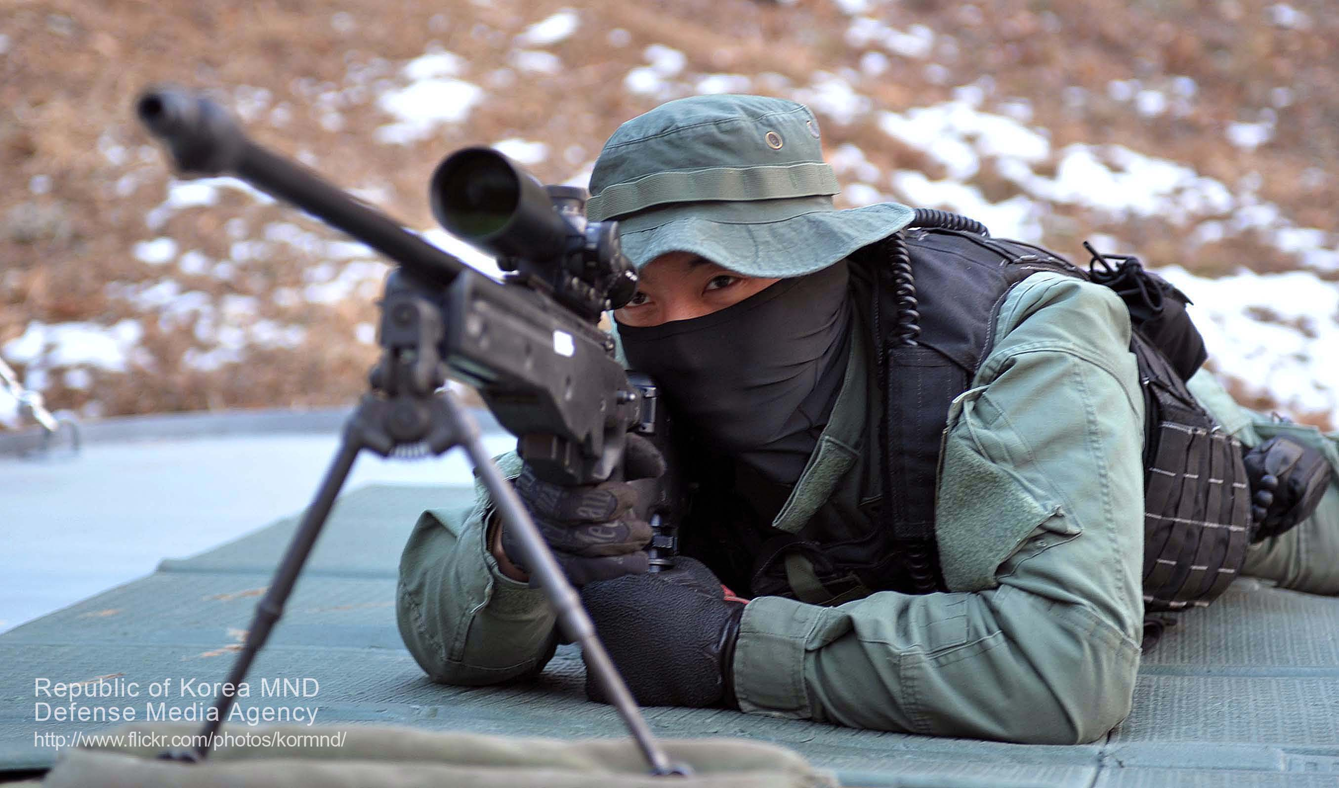 UDT/SEAL 저격수 촬영 - 김태형 기자